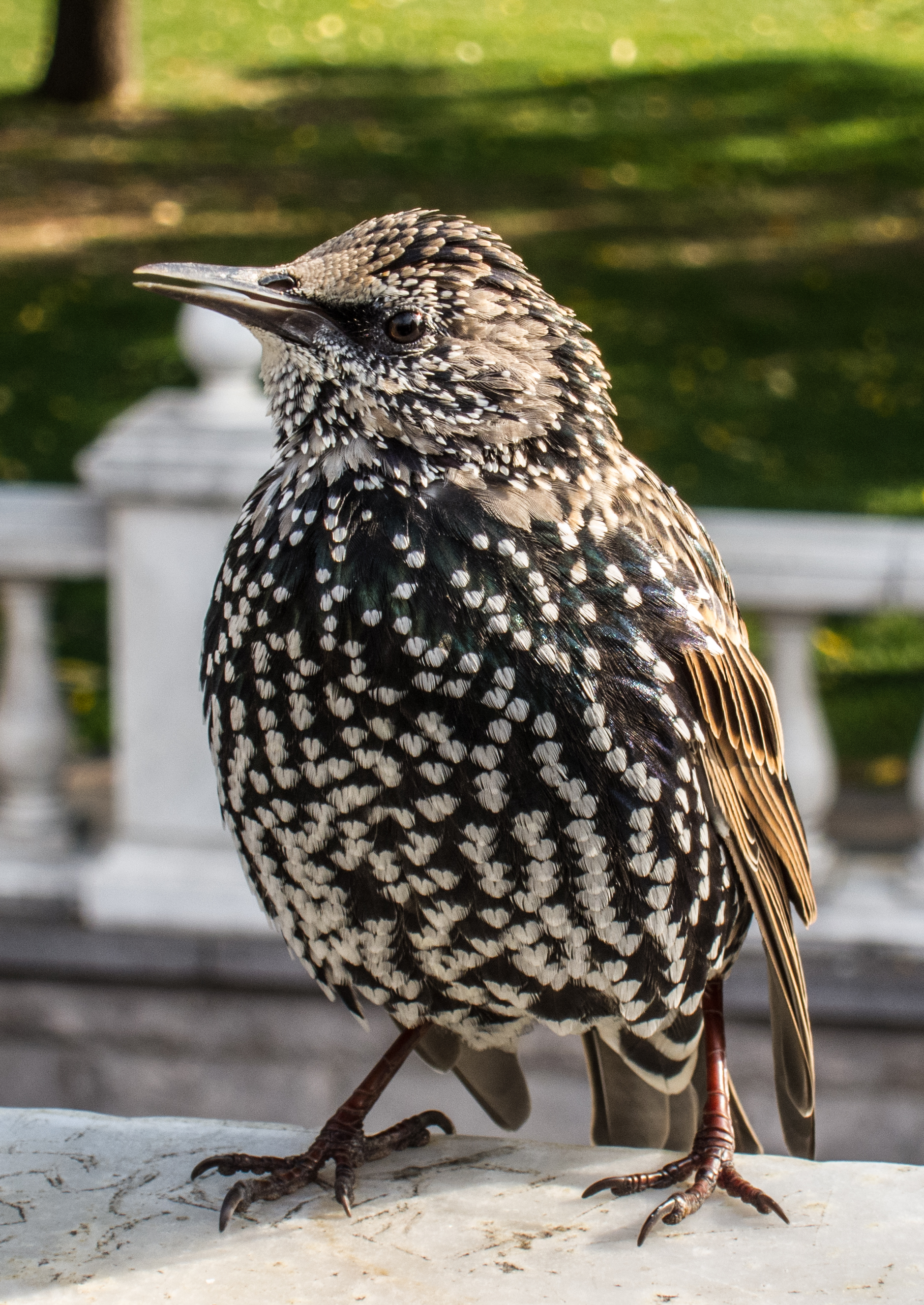 Скворец в Александровском саду